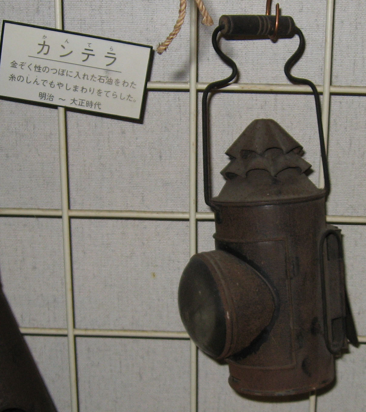 カンテラ（照明具）